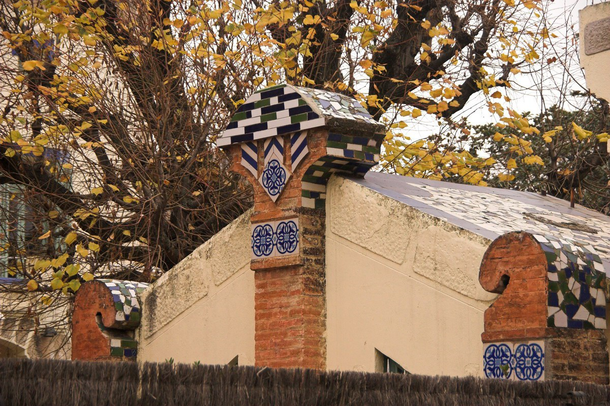 Alqueria Cloelia (Cardedeu-Vallès Oriental-Catalunya), obra de Joaquim Raspall de 1904. Detall de ceràmica i trencadís en una edificació auxiliar al jardí.